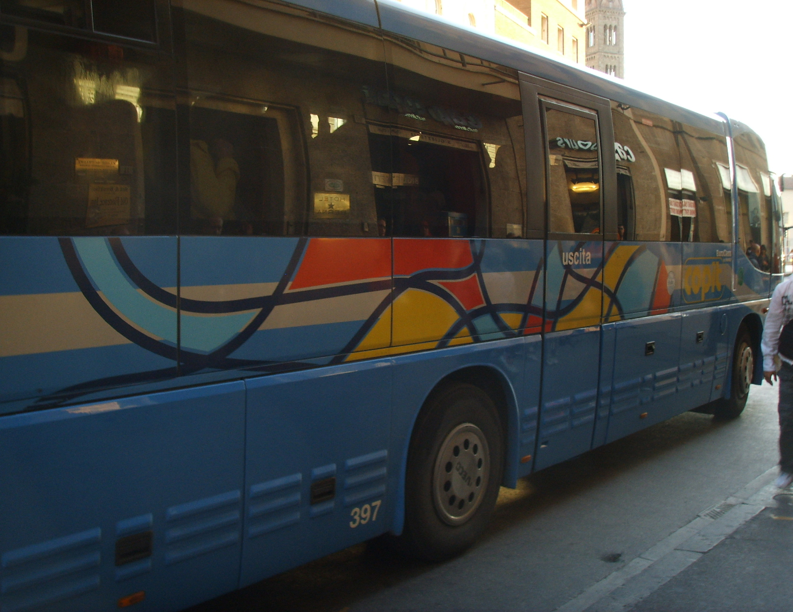 Bus copit